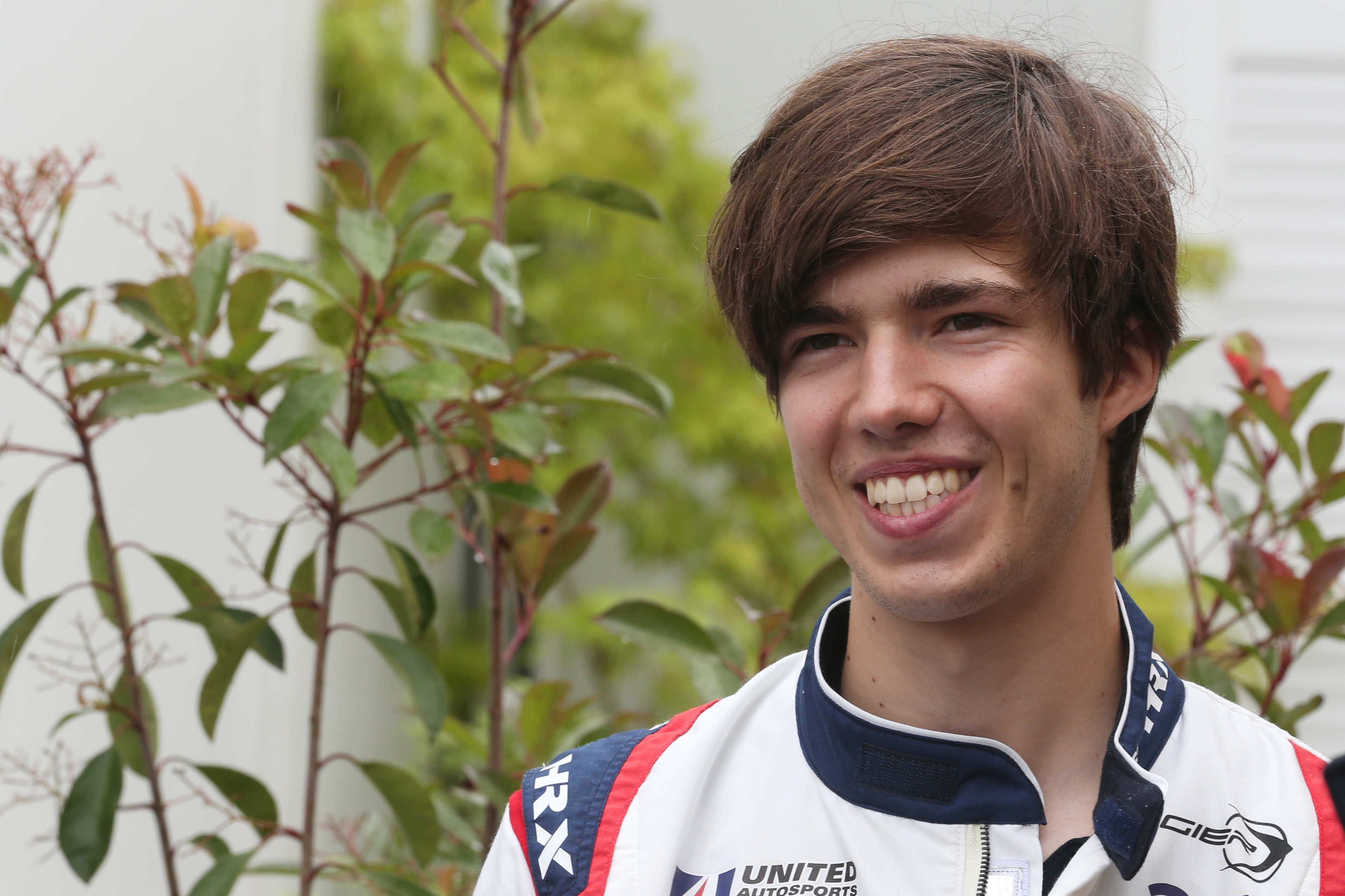 United Autosport lors des 24 Heures du Mans 2018.